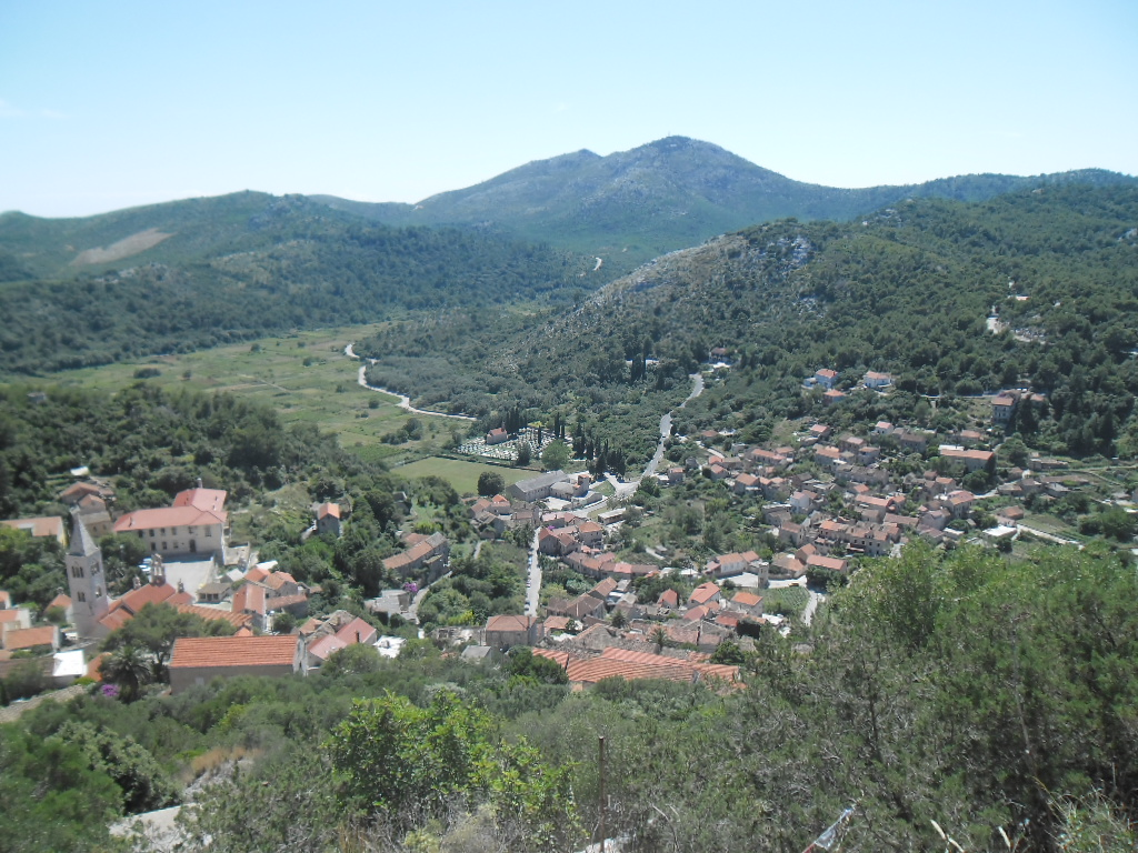 mjesto Lastovo